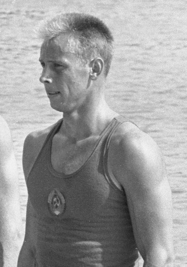 Europese roeikampioenschappen Bosbaan, 6 vier met Rusland 7 Blaisse en Venemans